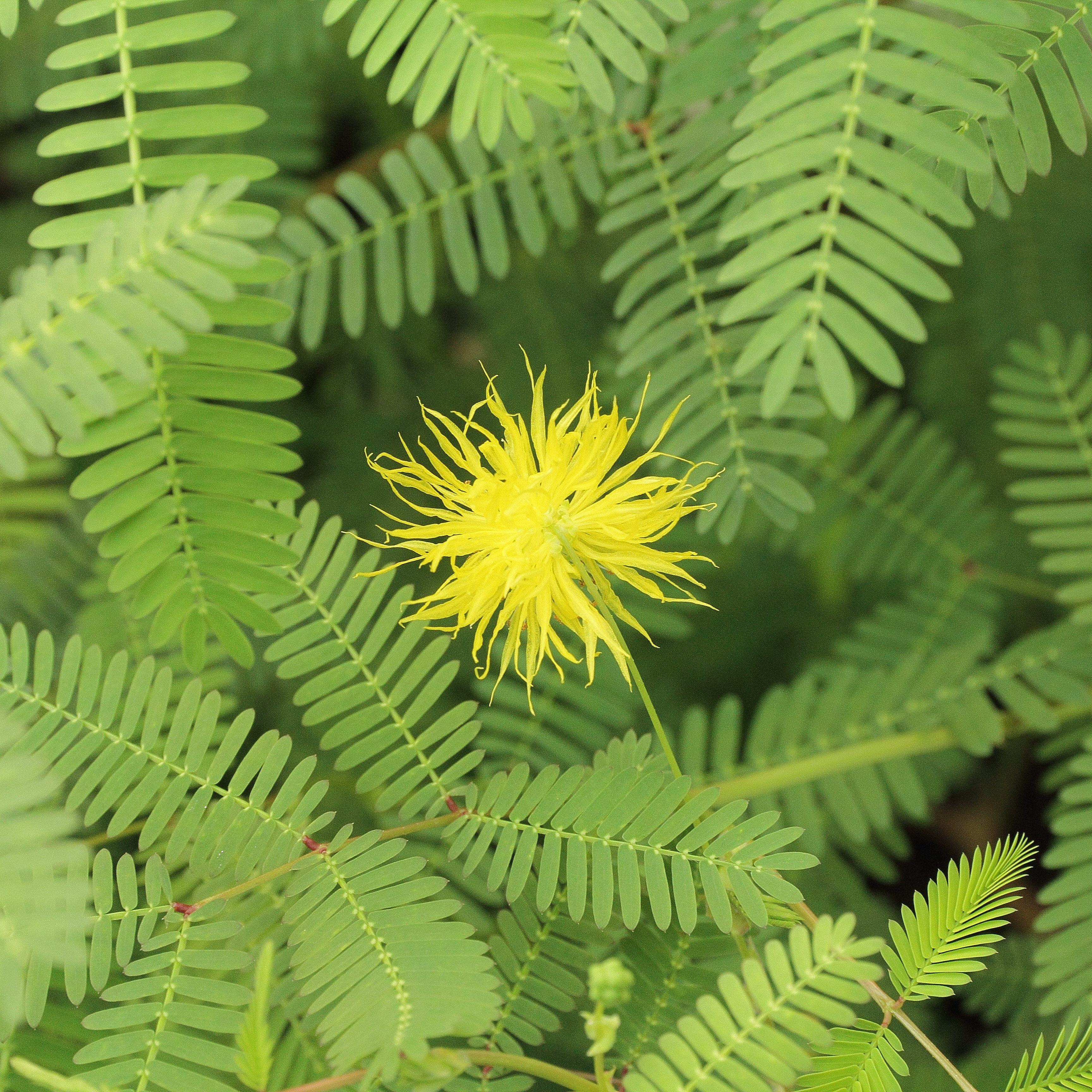 Neptunia oleracea i Bergianska trädgården.